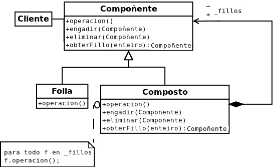 Diagrama da estructura do patrón Composite